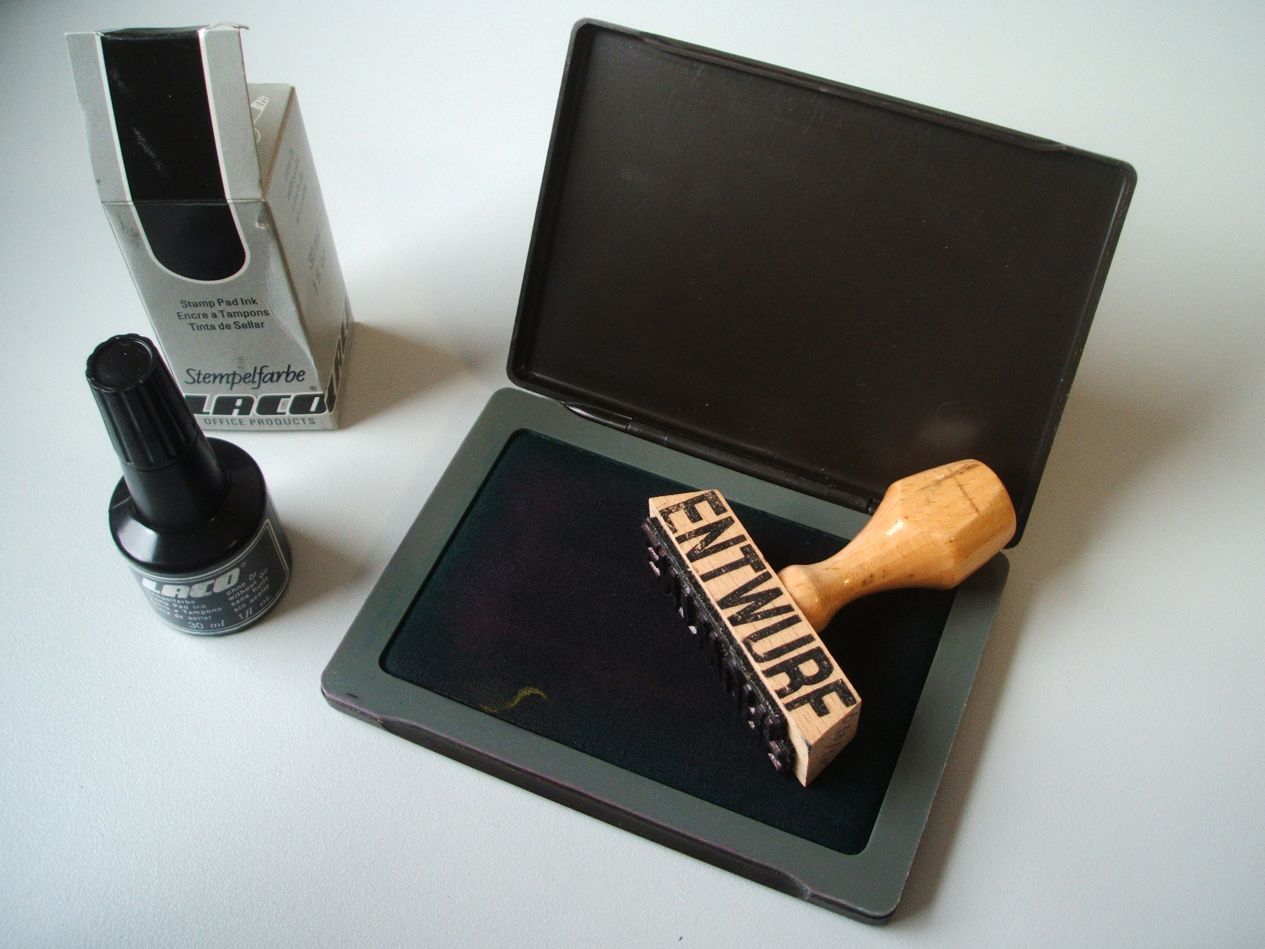 Stempelkissen von Geha mit Stempel und Stempelfarbe Anmerkungen: Stempelfarbe Laco, Entwurfstempel